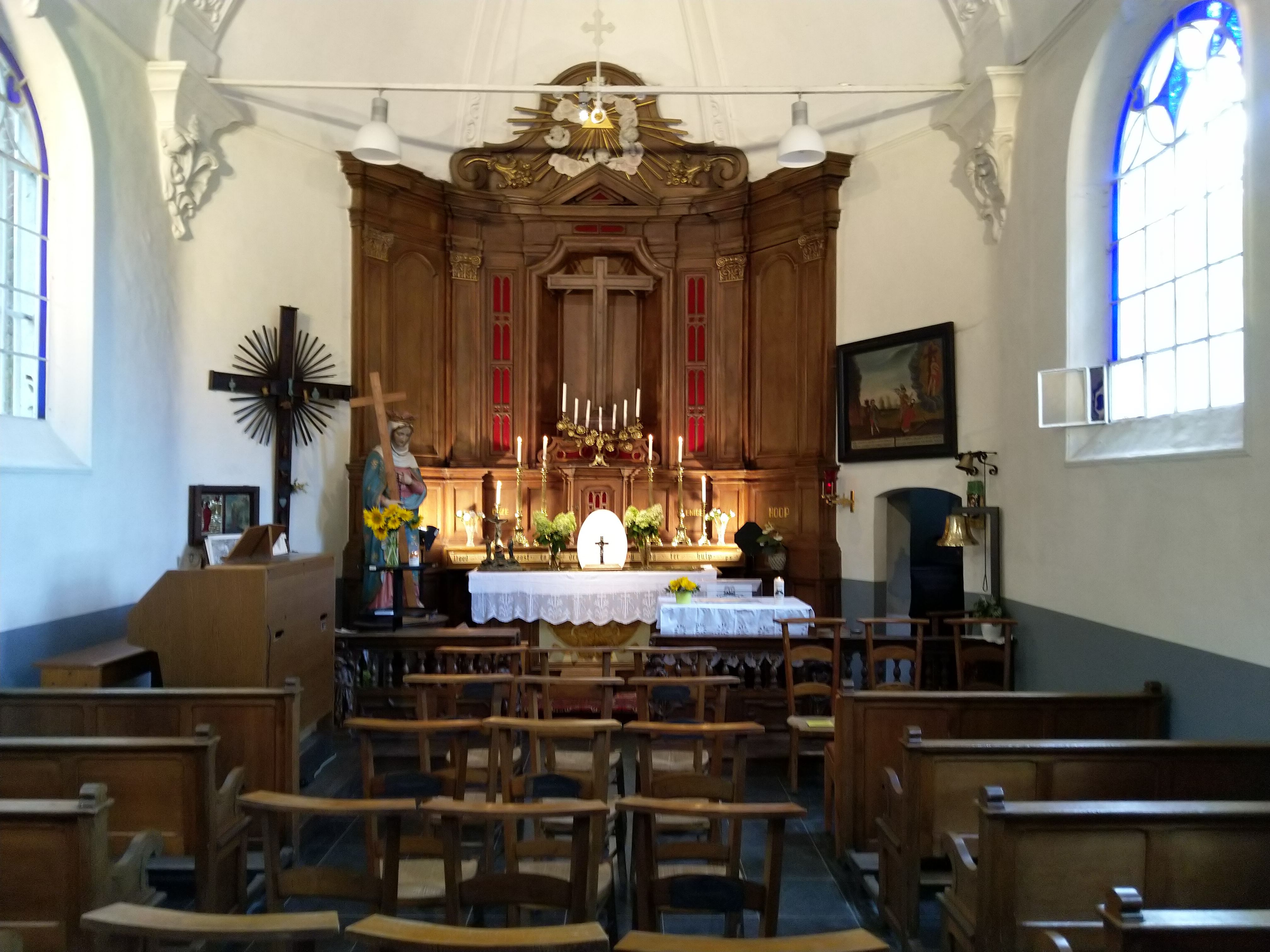 Binnenkant van de Kruiskapel te Eksaarde